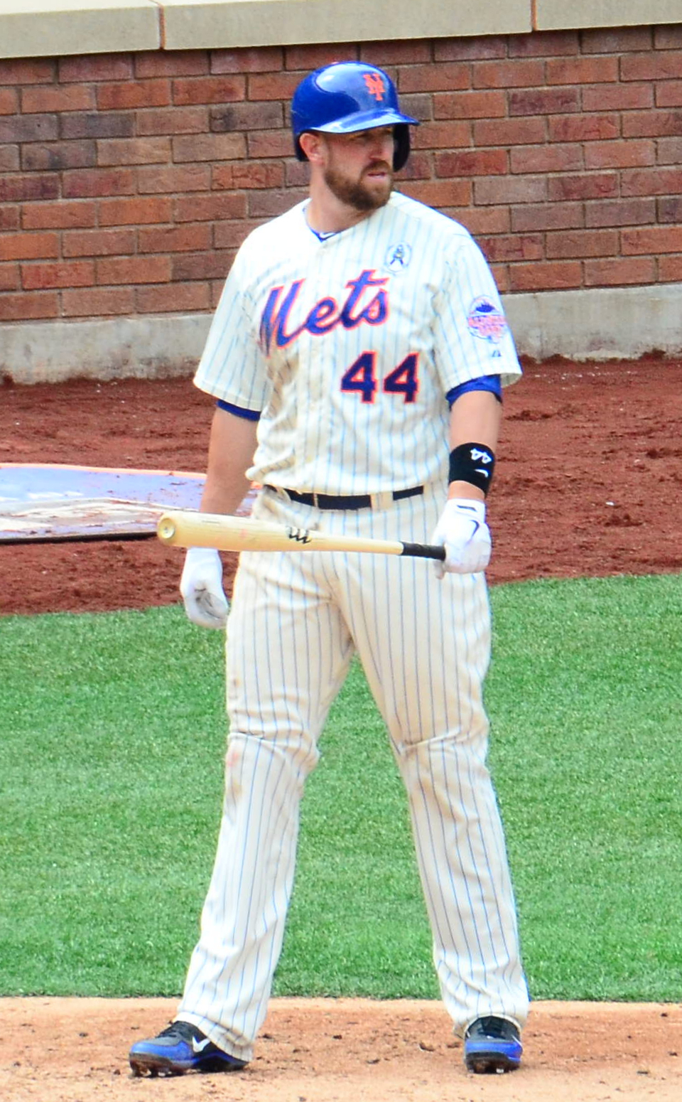 John Buck